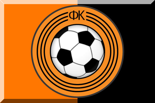 Fantasy football flag for Shaktar Donetsk